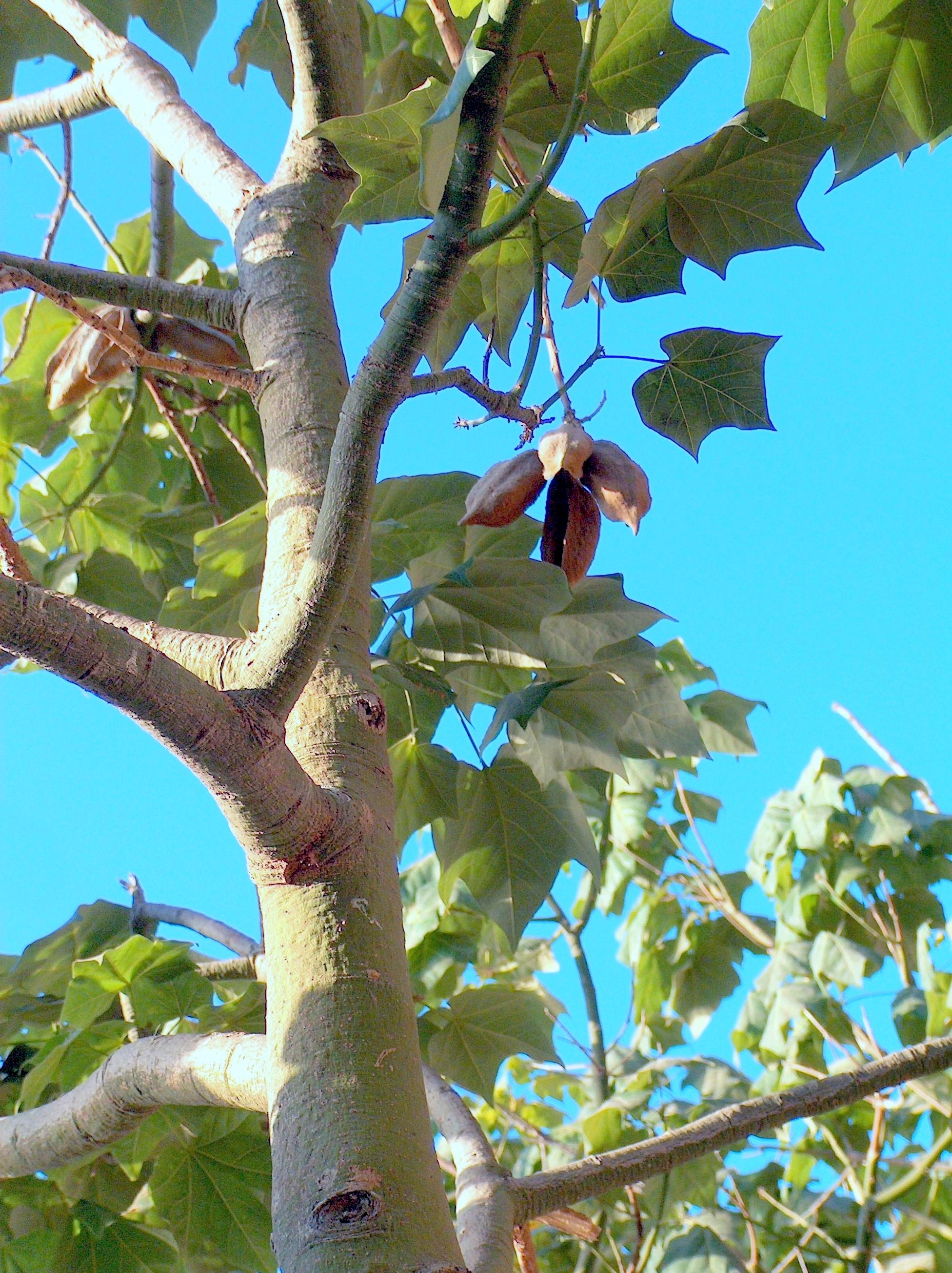 Brachychiton discolor : Frutos y vista parcial del árbol - Paseo Marítimo, Águilas (Murcia, España).